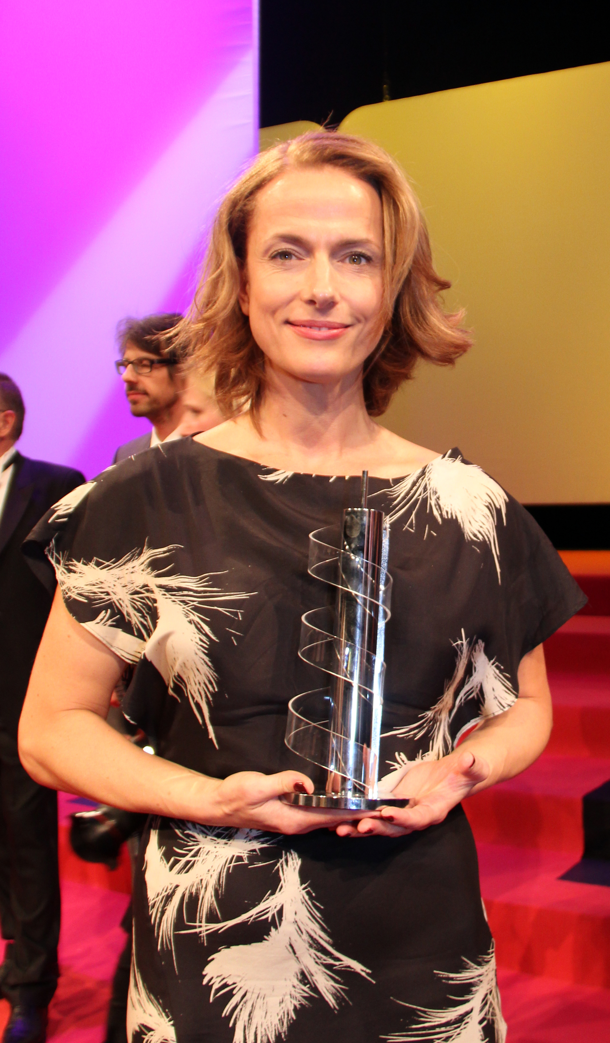 Preisträgerin Claudia Michelsen beim Hessischen Film- und Kinopreis 2012